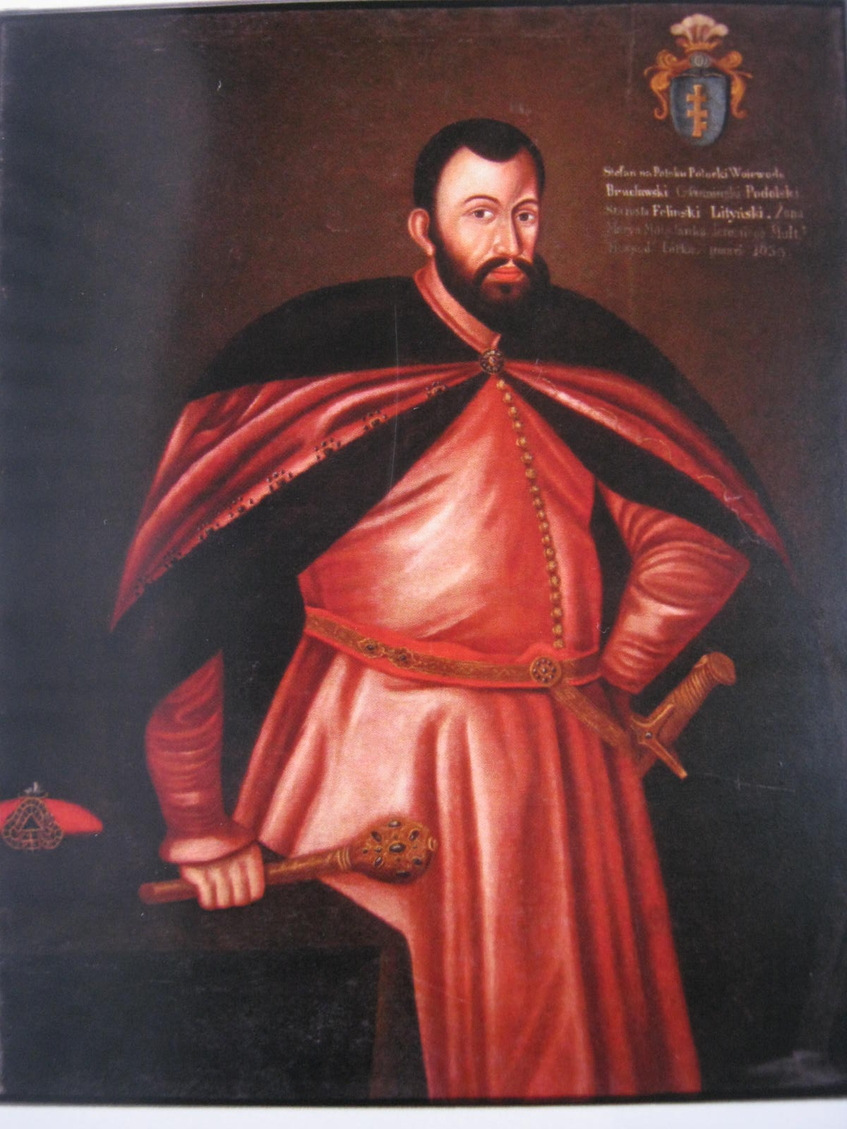 Стефан Потоцький (генеральний староста Поділля)